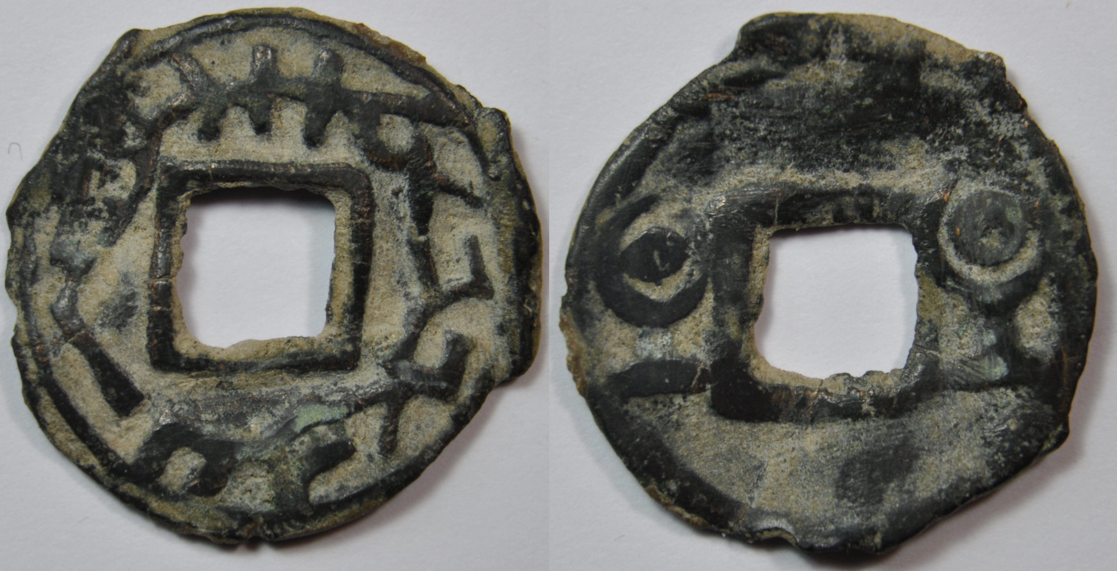 Une sapèque de la principauté de Samitan en Sogdiane datant des VIIe-VIIIe siècles. A/Légende Sogdiane autour de perforation rectangulaire centrale R/ Tamgas autour de perforation rectangulaire centrale Dimension : 20.7 mm Poids : 1.5 g. Référence : Smirnova